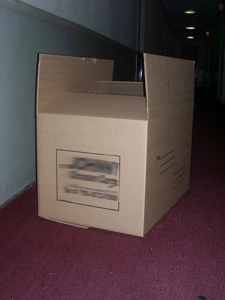 Isang Balikbayan Box.